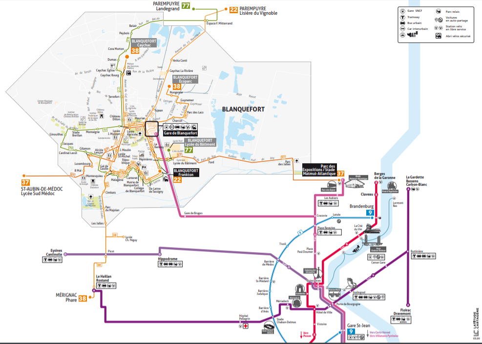 Plan du réseau TBM dans la commune de Blanquefort [Bus et Tram]